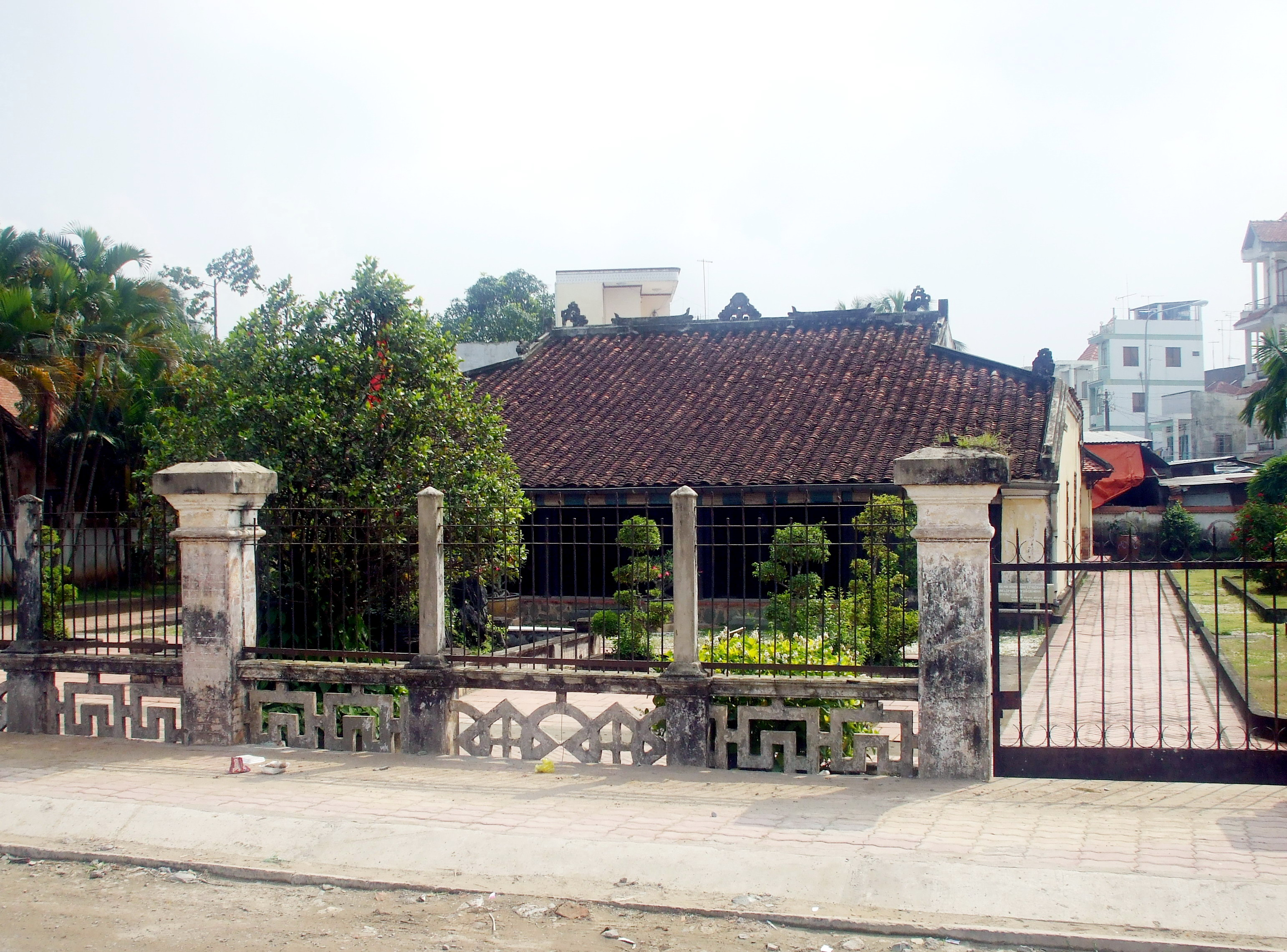 Nhà cổ Đốc Phủ Đẩu, xây năm 1890, tọa lạc số 18 đường Bạch Đằng, phường Phú Cường, TP Thủ Dầu Một, tỉnh Bình Dương.